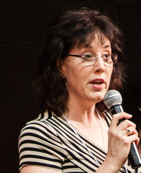 Janette Rallison